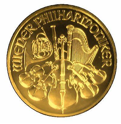 Wiener_Philharmoniker_coin_Reverse